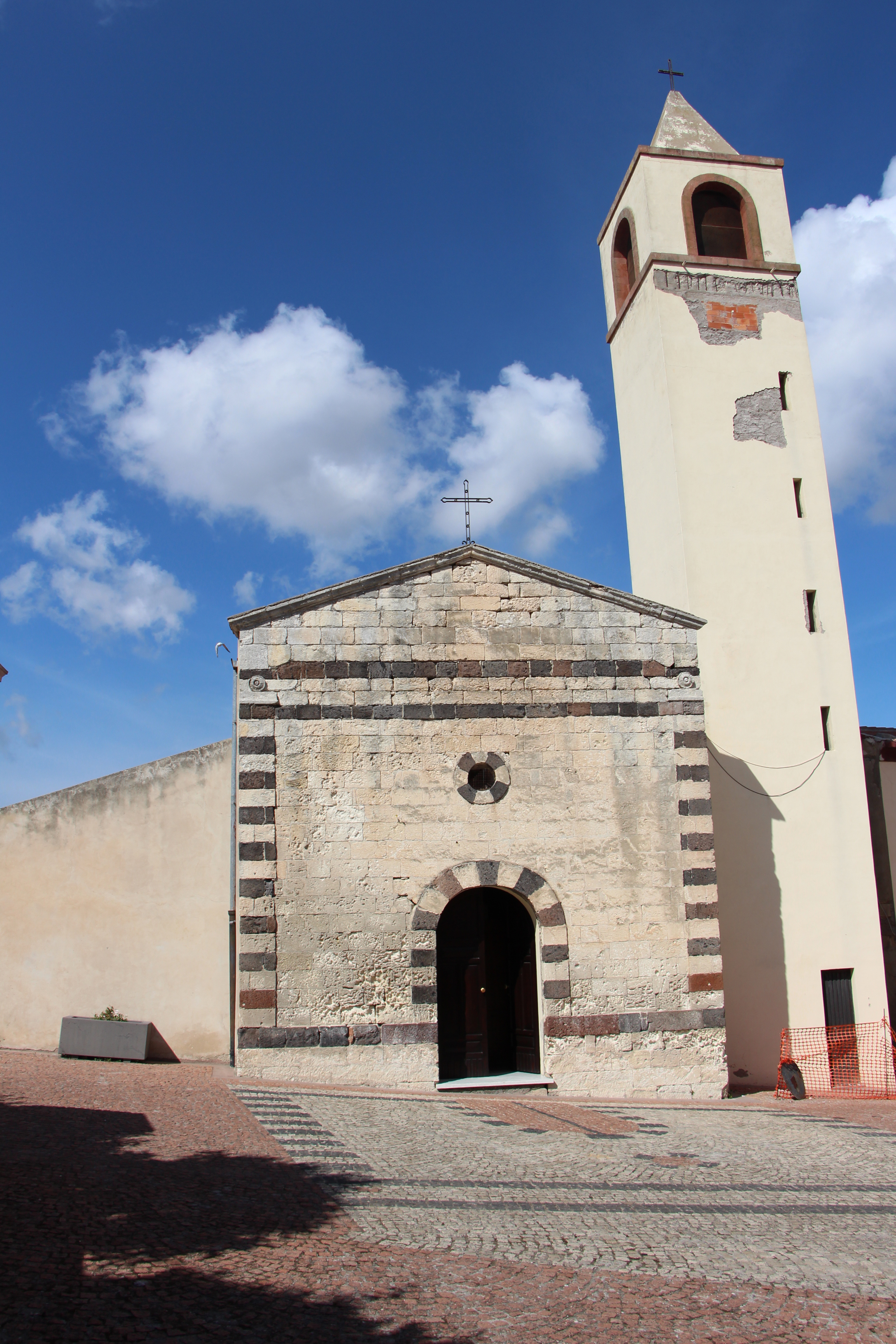 Bulzi (SS)